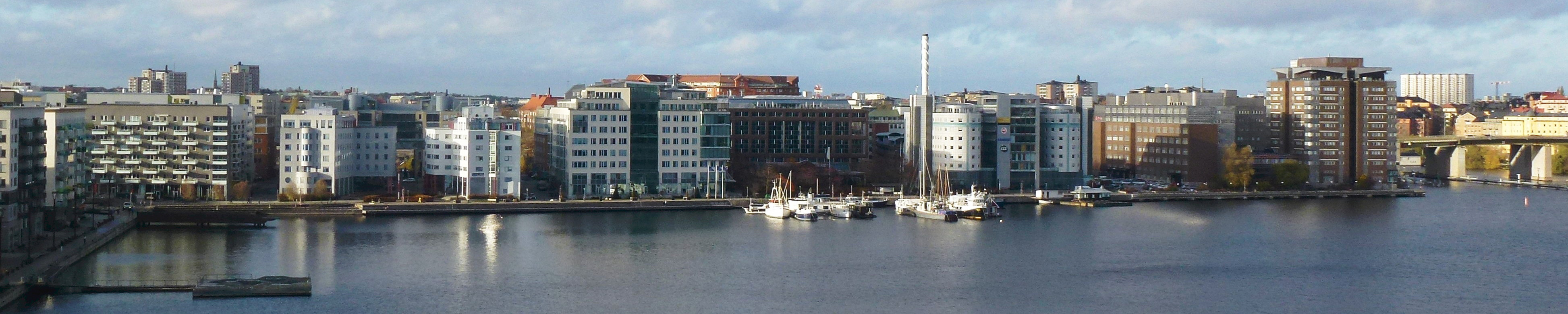 Vy över Liljeholmen med Marievik och Årstaviken